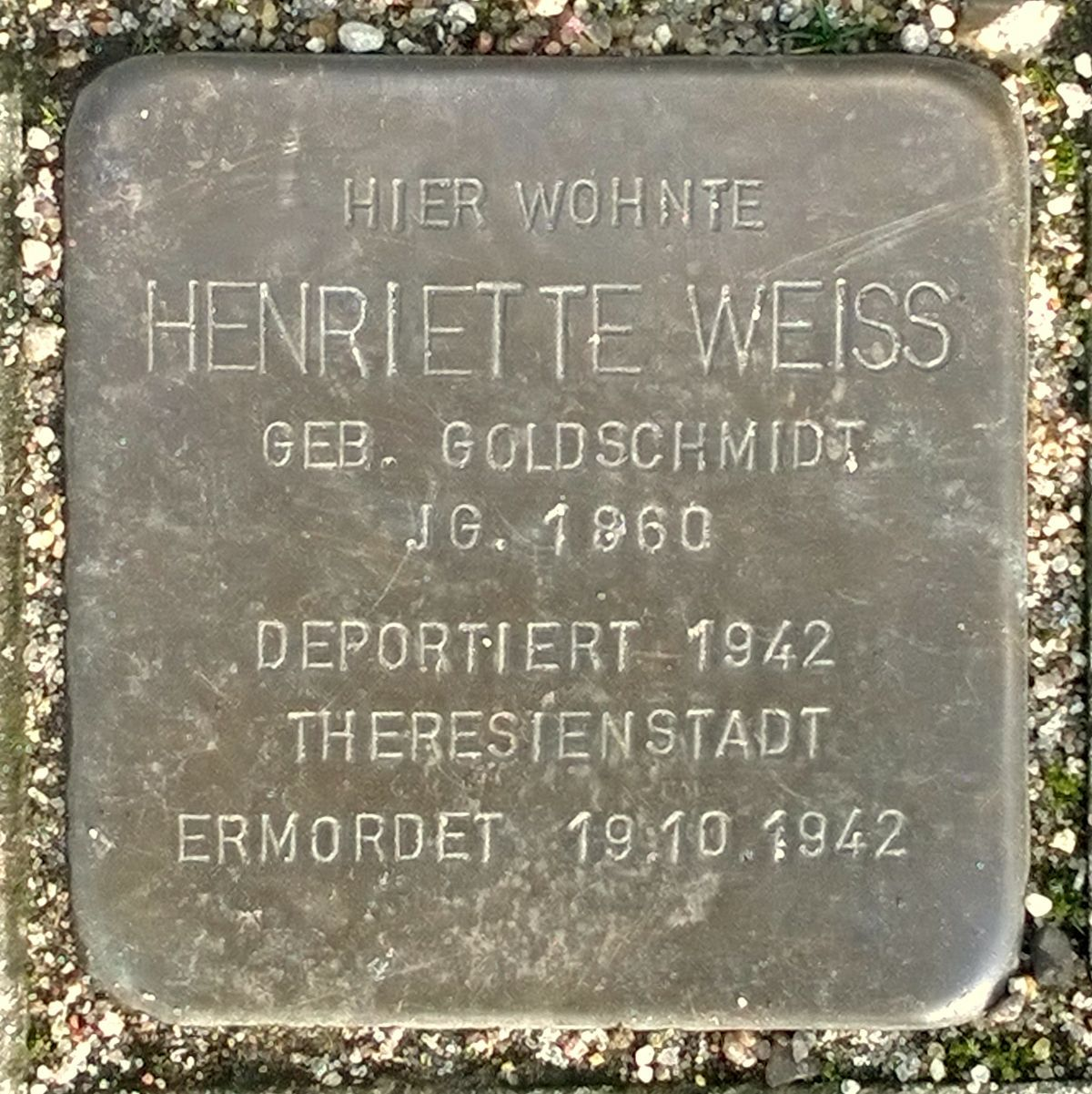 Stolperstein für Henriette Weiss geb. Goldschmidt, Eilbeker Weg/Ecke Kantstraße in Hamburg-Eilbek